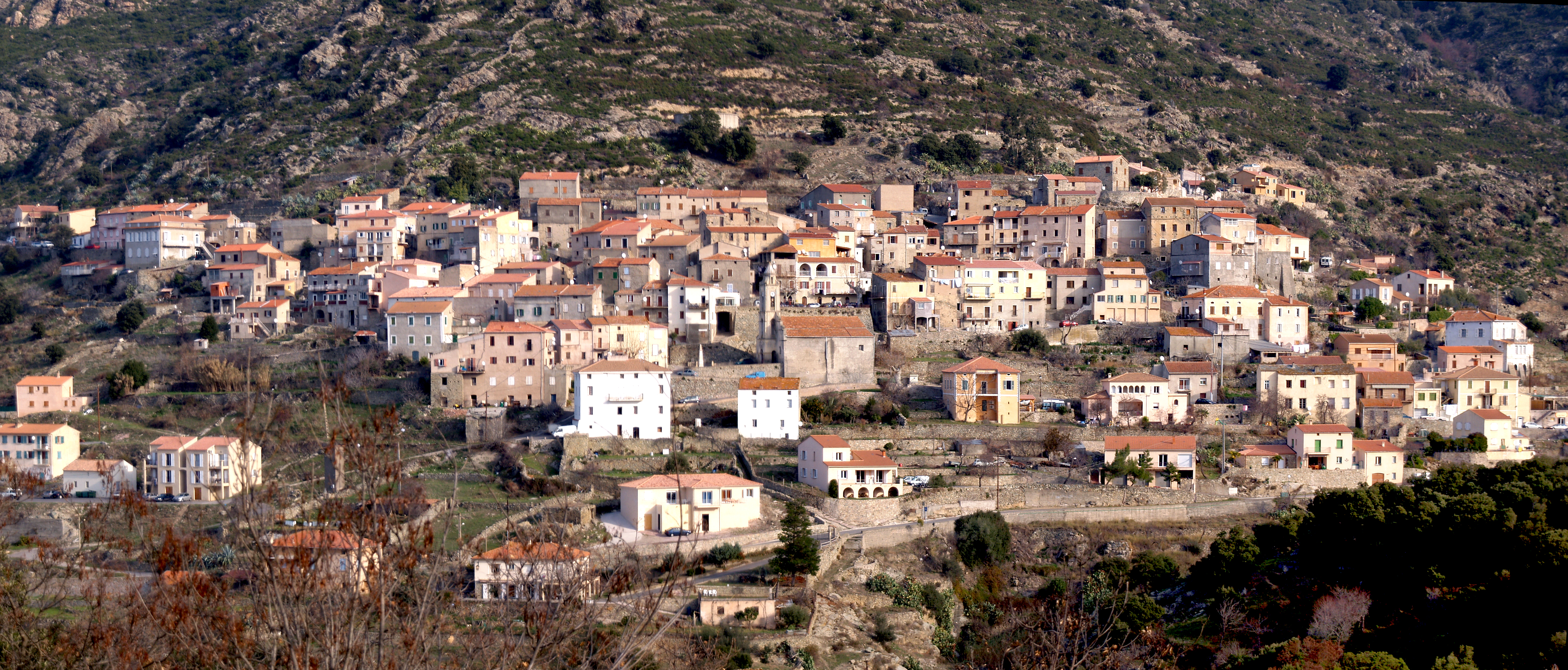 Pietralba (Corsica) - Panoramique du village